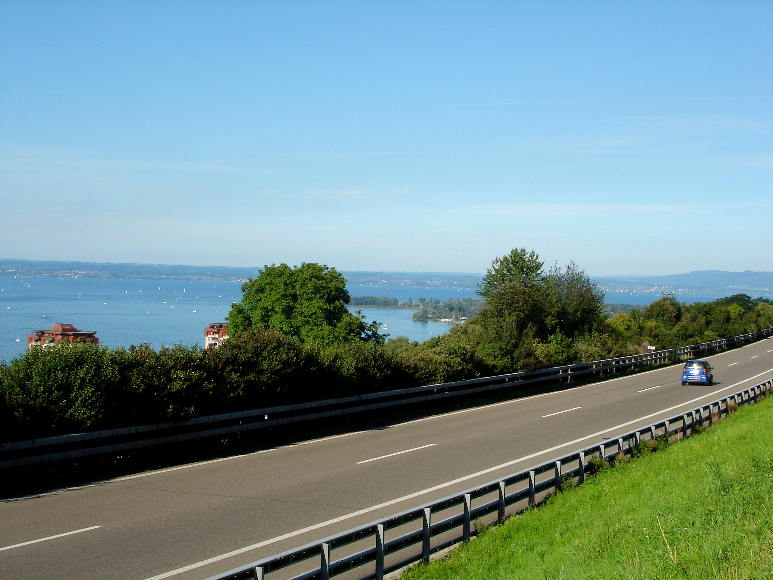 Schweiz: Autobahn A1 (Europastraße E 60) am Südufer des Bodensees